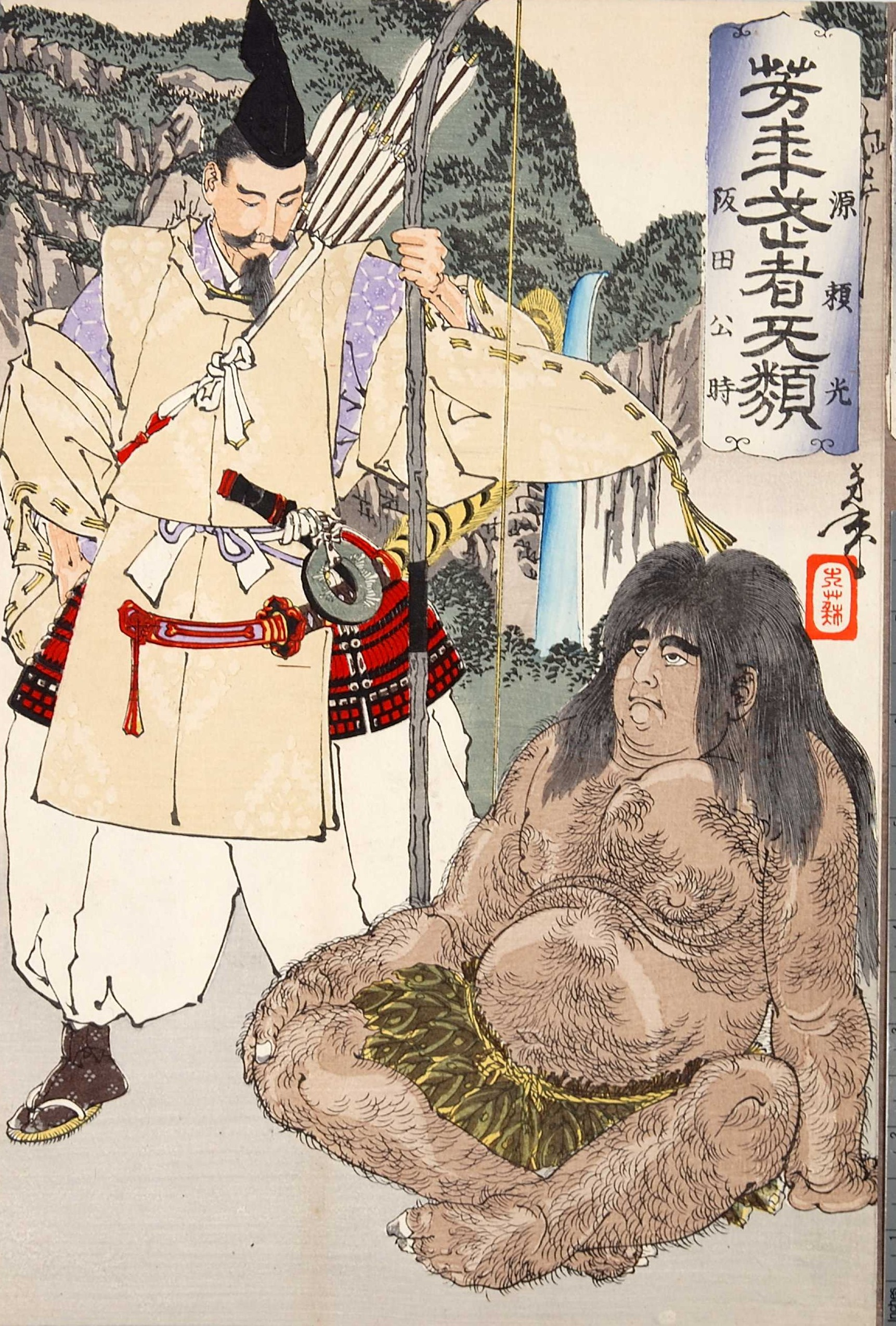 源頼光 坂田公時 月岡芳年画「芳年武者无類」。頼光の家来となり、頼光四天王と呼ばれた坂田金時が頼光と初めて会った場面を描いたもの